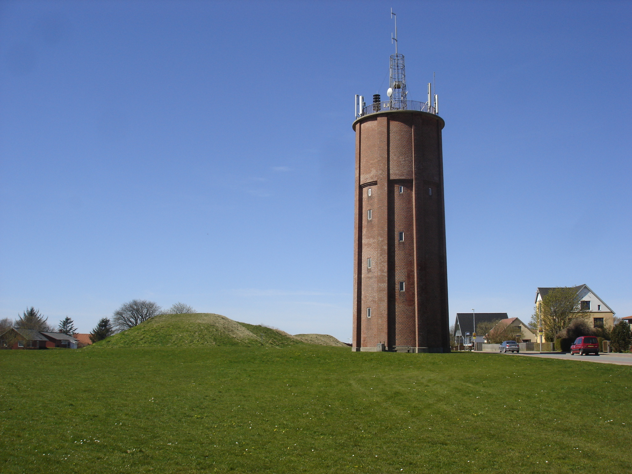 Thisted Vandtårnved siden af den 132 meter lange Langhøj ved Langdyssevej